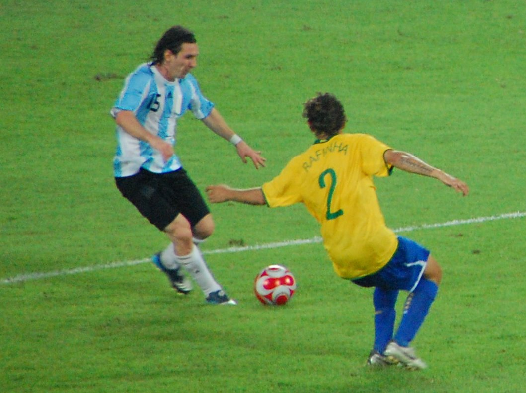 Messi